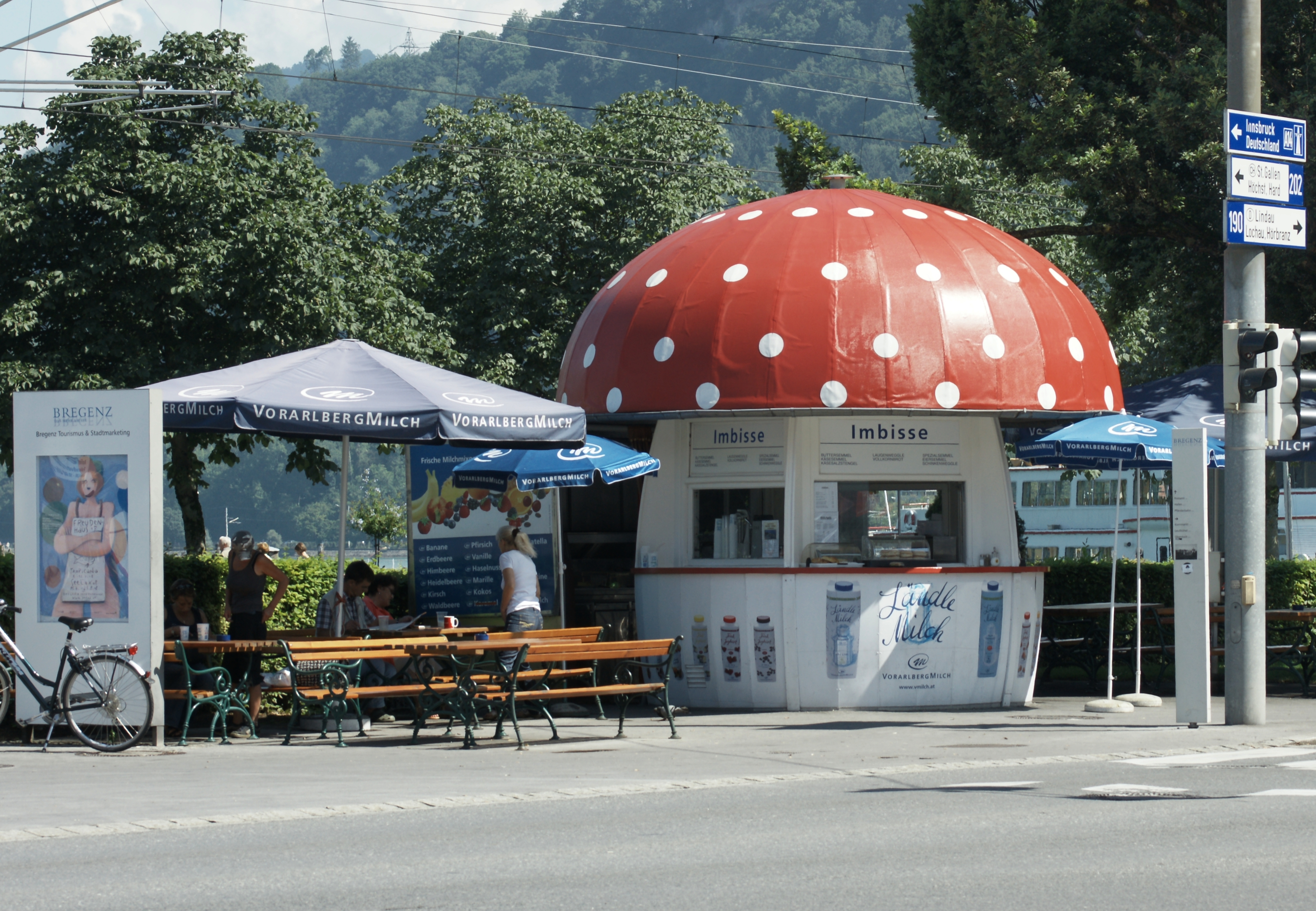 Ein Pilzkiosk ist ein für die 1950er Jahre typisches Kioskgebäude in Form eines Fliegenpilzes, das ursprünglich für die Verkaufsförderung von Milch und Milchprodukten als „Milchpilz“ entwickelt wurde. Dieser steht in Bregenz, Nähe Hafen